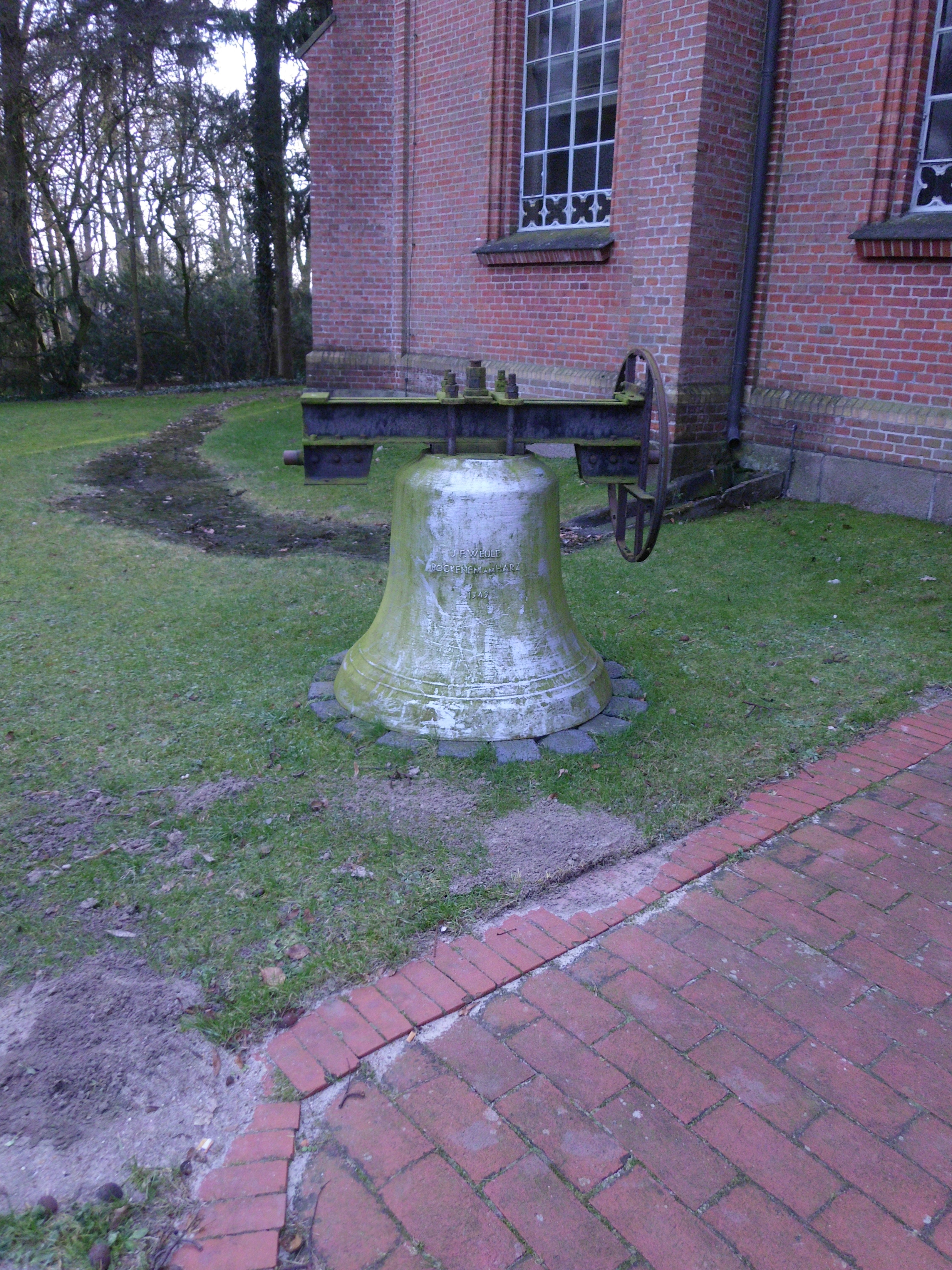 wurde um 2010 durch eine Bronzeglocke ersetzt